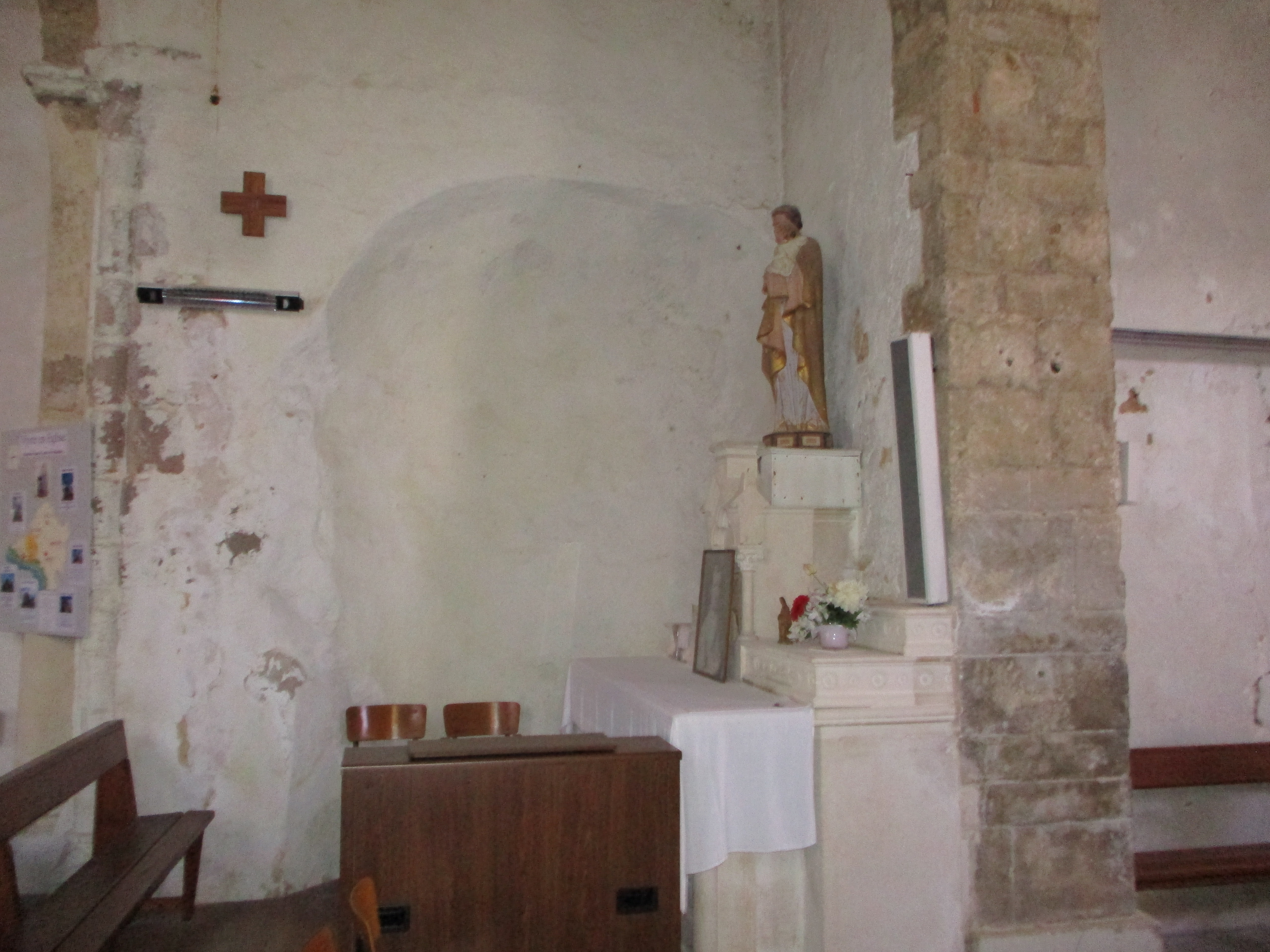 Photographie de l'intérieur de l'église Saint Vincent de St Vincent sur Jard en Vendée, montrant une des deux niches de la nef.